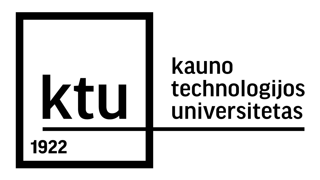 KTU logotipas